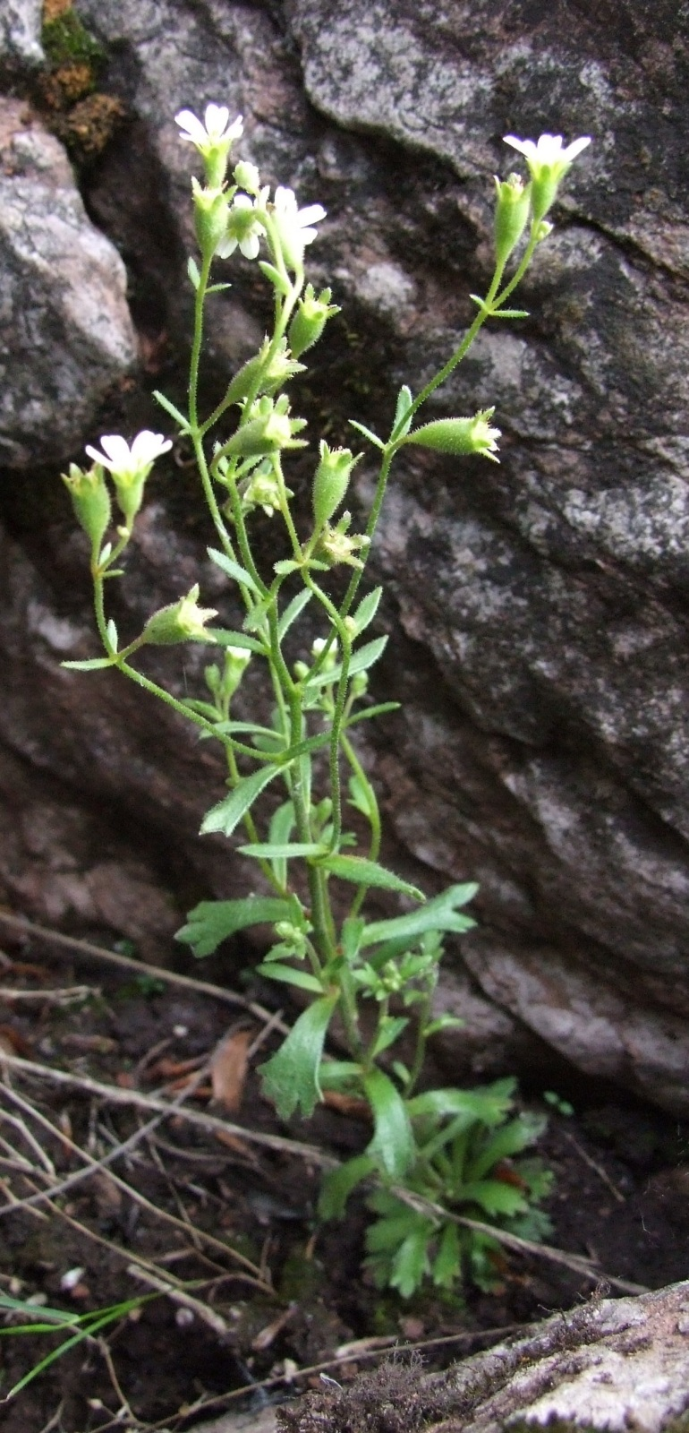 Saxifraga adscendens (habitat:Pieniny)